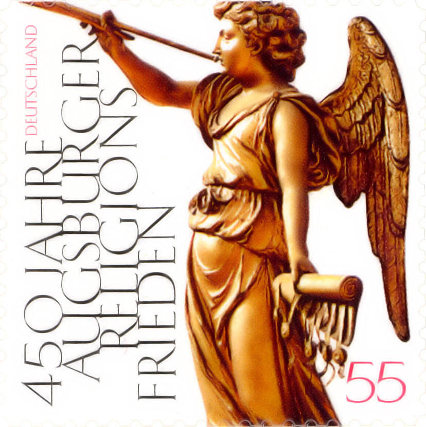 Sonderbriefmarke der Deutschen Post aus dem Jahr 2005, 450 Jahre Augsburger Religionsfriede